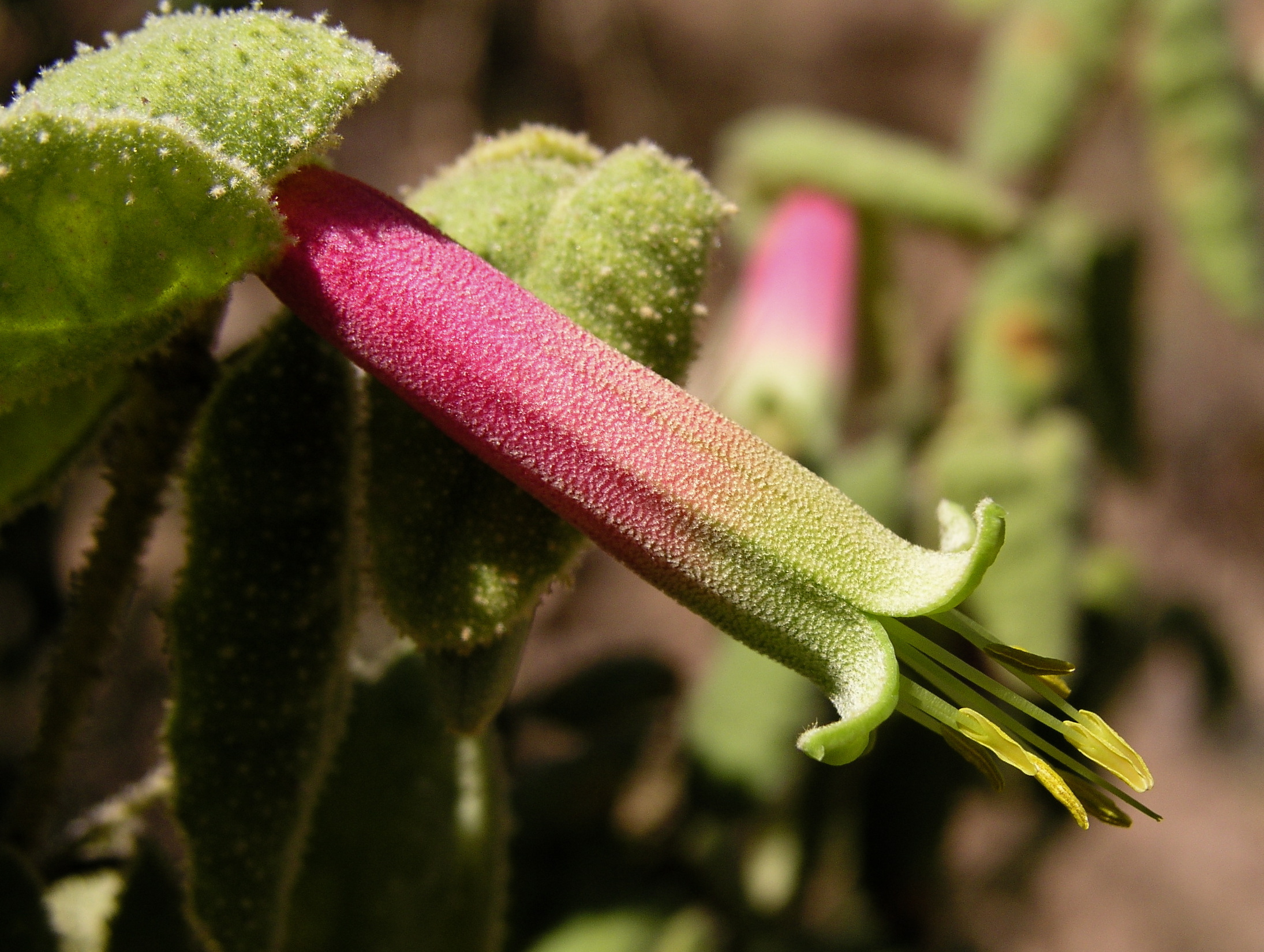 Fleurs de Correa reflexa